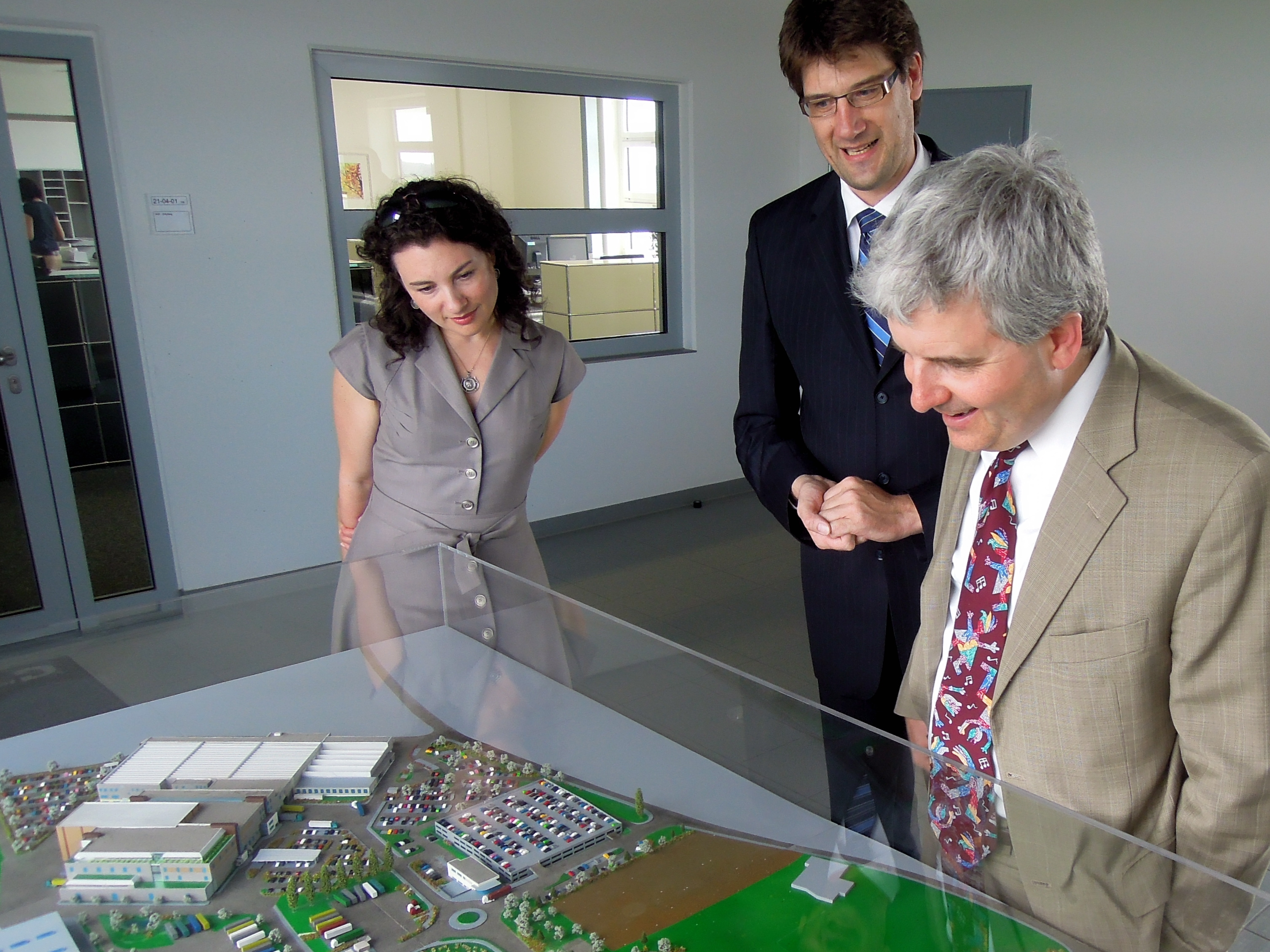 US-Konsulin für öffentliche Angelegenheiten Leyla Ones (links) und US-Generalkonsul Conrad Tribble (rechts) vor einem Modell der Firma Dräxlmaier.